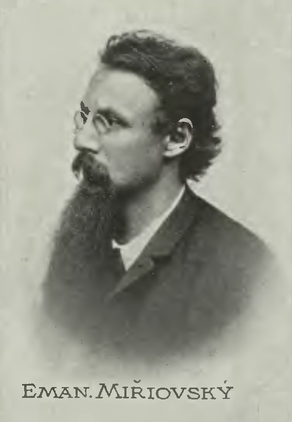 Portrét – Emanuel Miřiovský (1846-1914), Český spisovatel a překladatel.